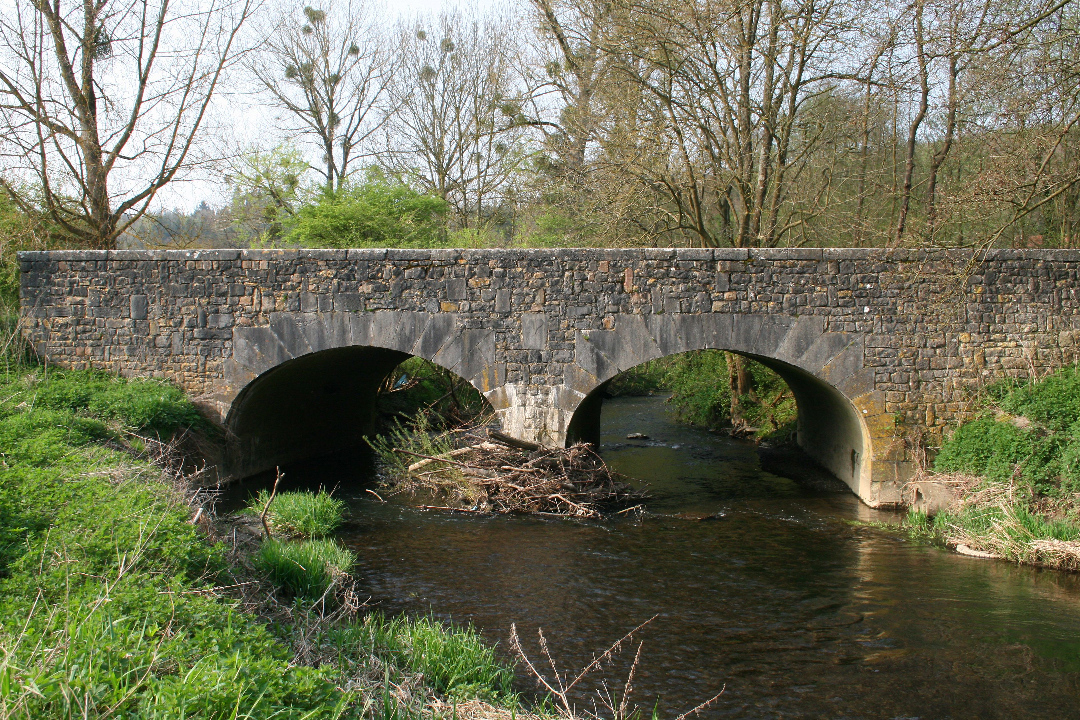 Leval-Chaudeville (Belgique), vieux pont sur la Hantes.